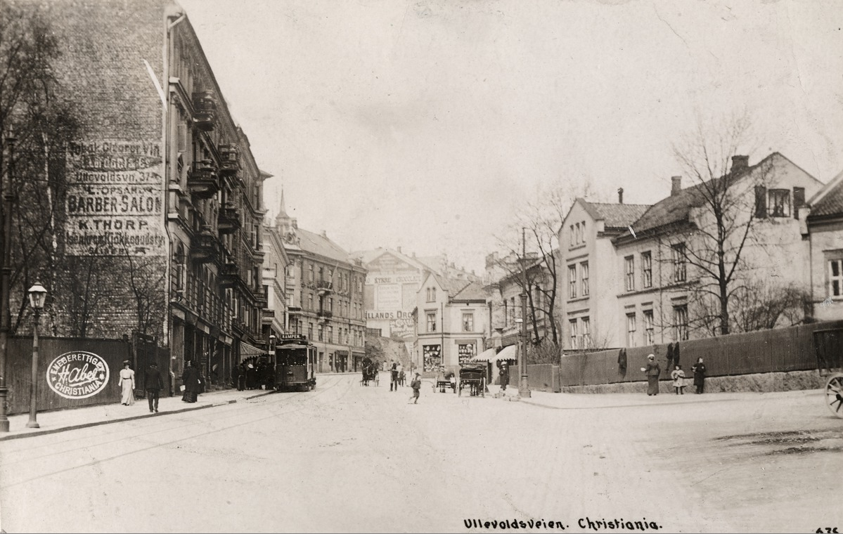 Ullevålsveien sett oppover mot Waldemar Thranes gate, fra krysset med Akersbakken, ca. 1905